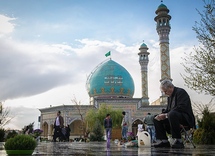 Emamzadeh Taher in Karaj, Iran.